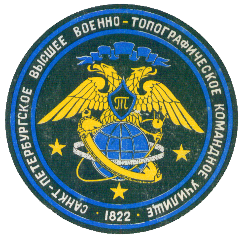 шеврон военно-топографического училища (образец 1999 года)